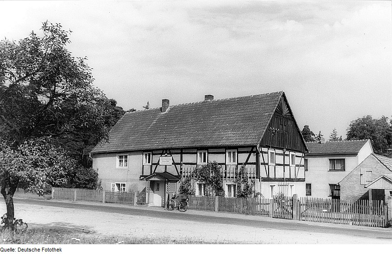 Original image description from the Deutsche Fotothek Königswartha-Oppitz. Gasthaus, soll ehem. zur Mühle gehört haben